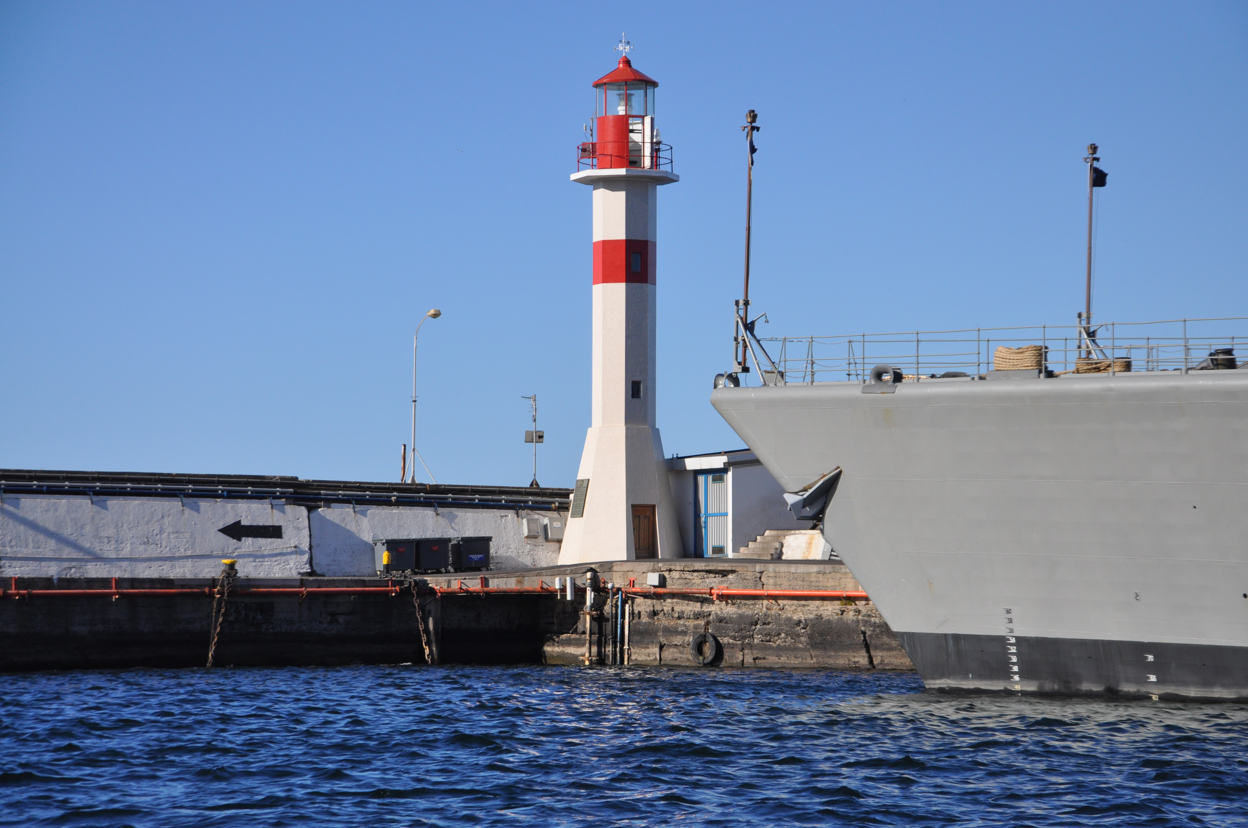 Valparaiso